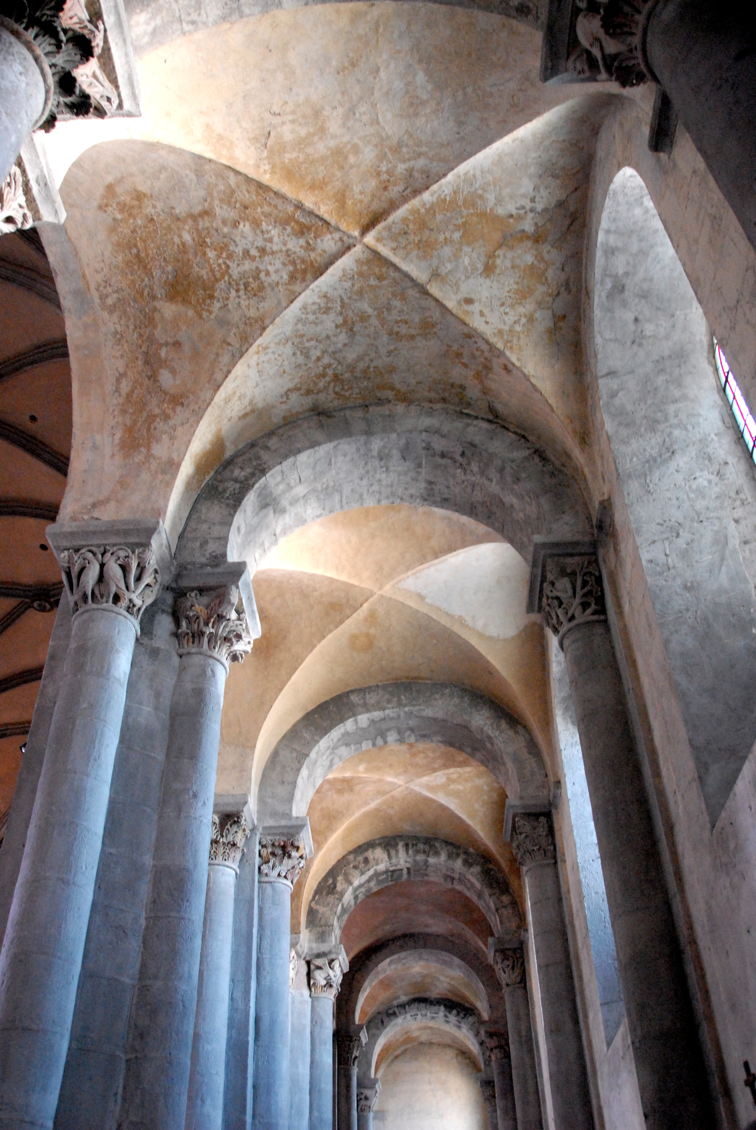 Mozac, Kreuzgratgewölbe, Gurtbogen, nördl. Seitenschiff